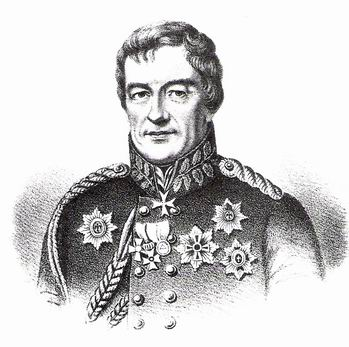 Portrait Ludwig Freiherr von Wolzogen